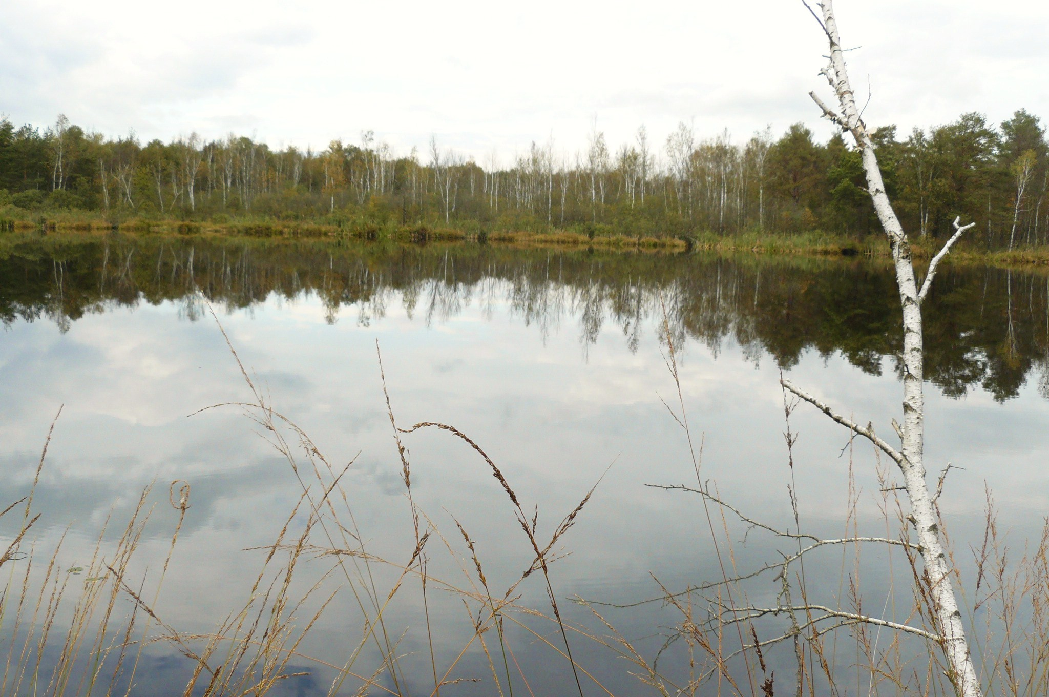 Bagno Chlebowo - torfowisko (torfianki). Gm. Ryczywół.